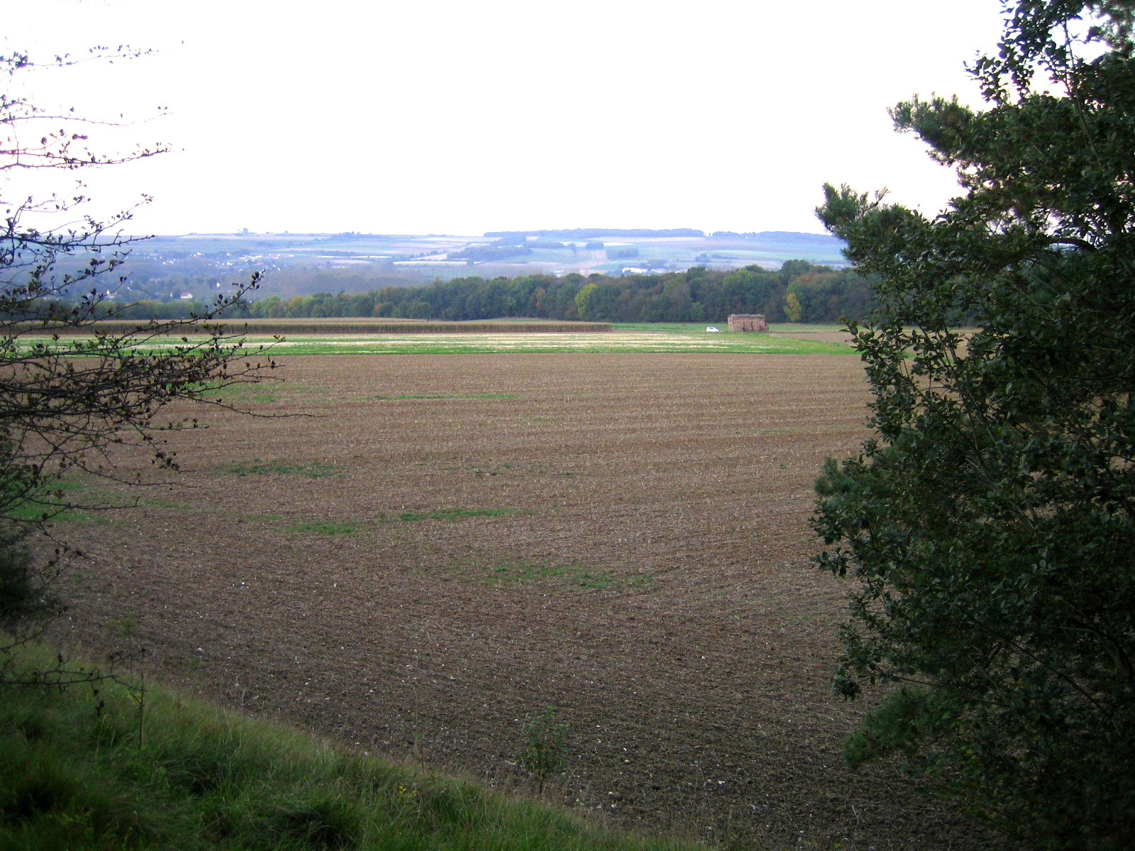 Liercourt (Somme, France) - Panorama sur la vallée depuis le sommet du talus de l'oppidum. .